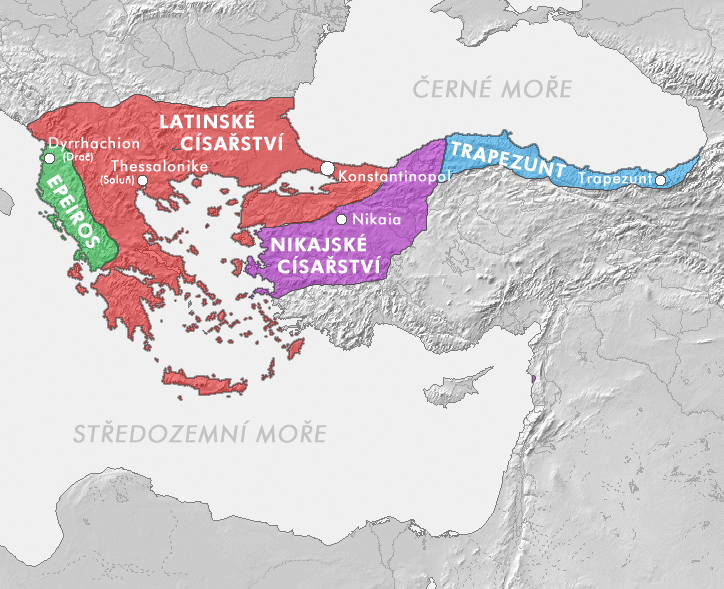 Byzantská říše po dobytí Konstantinopole roku cs:1204